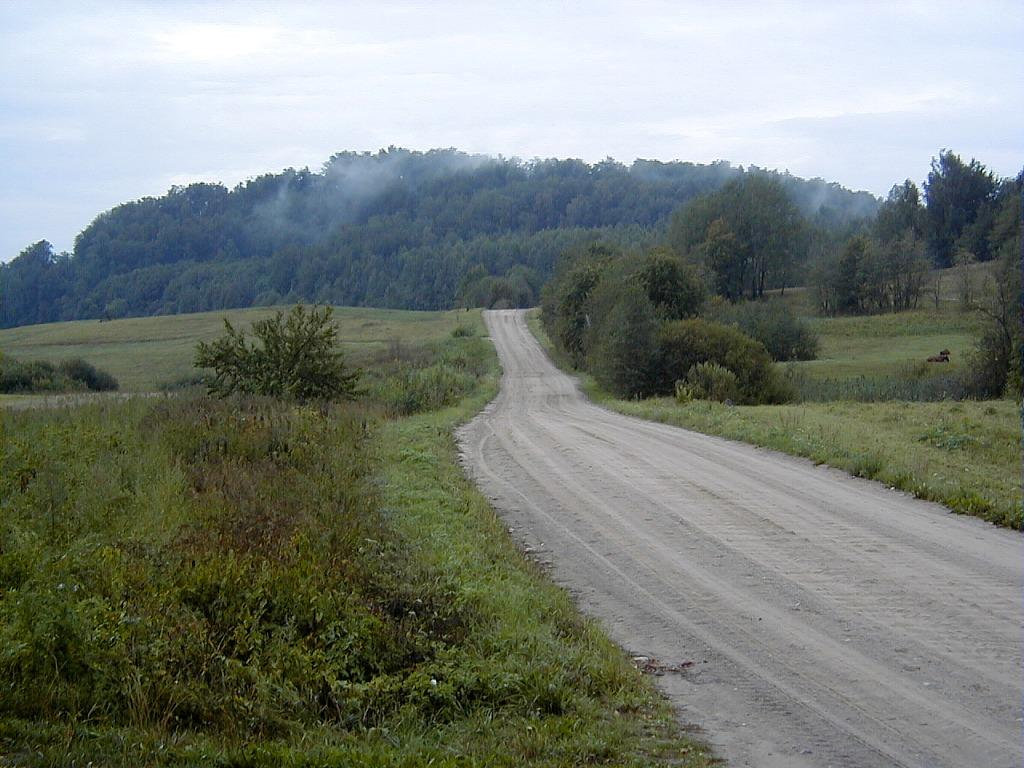 Mākoņkalns